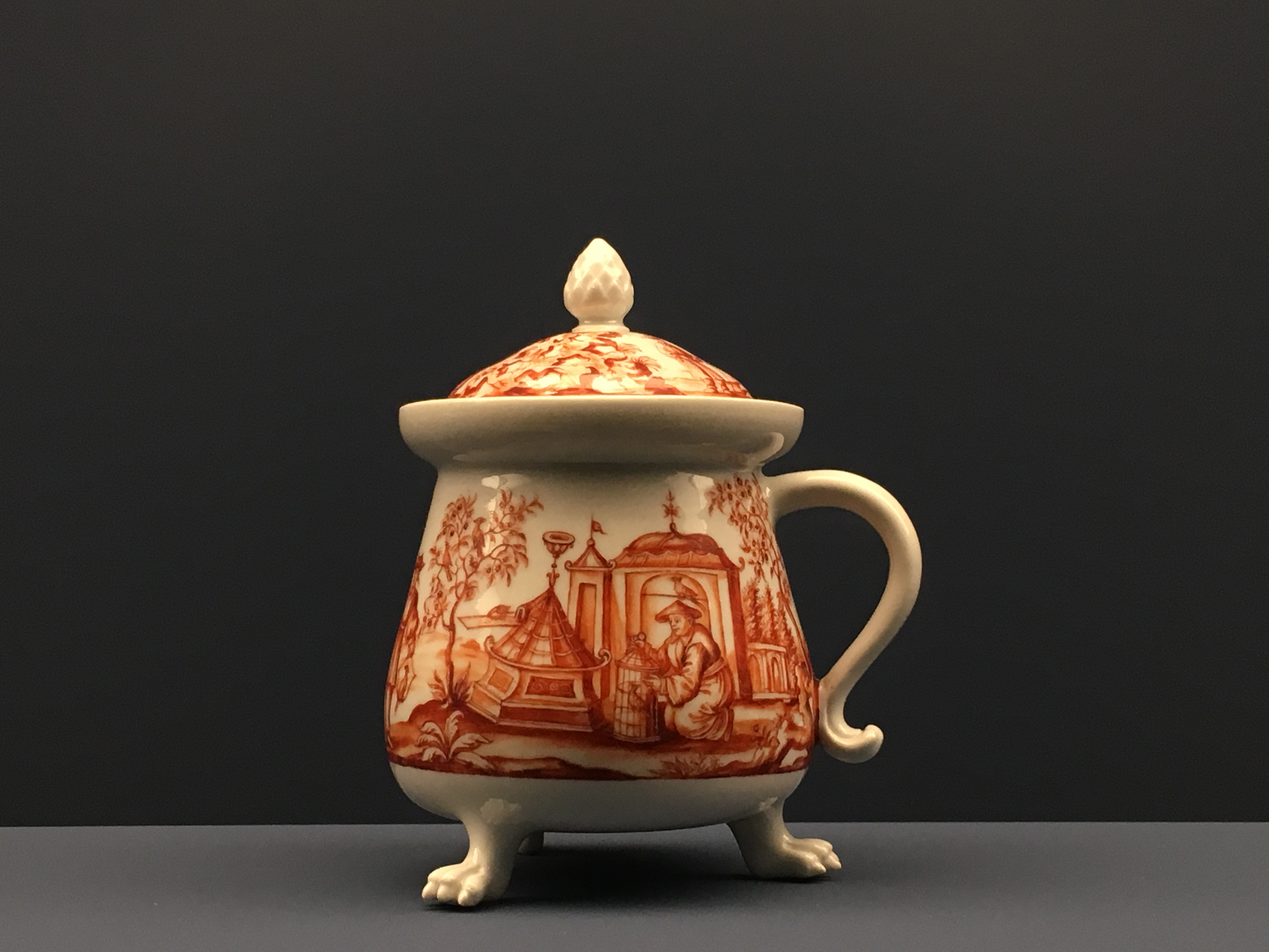 Oberstopf mit Chinoiserien und Klauenfüßen, um 1725/30. Hartporzellan, Eisenrotcamaïeu. Manufaktur Du Paquier, Wien (1718-1744), Ignaz Preissler (1676-1741). Erworben 2005 durch Fürst Hans-Adam II. von und zu Liechtenstein. (Ausstellung Liechtenstein. Die Fürstlichen Sammlungen. 12.11.2016 – 19.03.2017, Kunstmuseum Bern.)